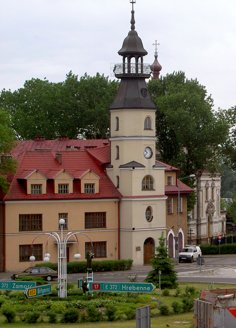 Tomaszów Lubelski, Poland • Państwowa Szkoła Muzyczna / State Music School